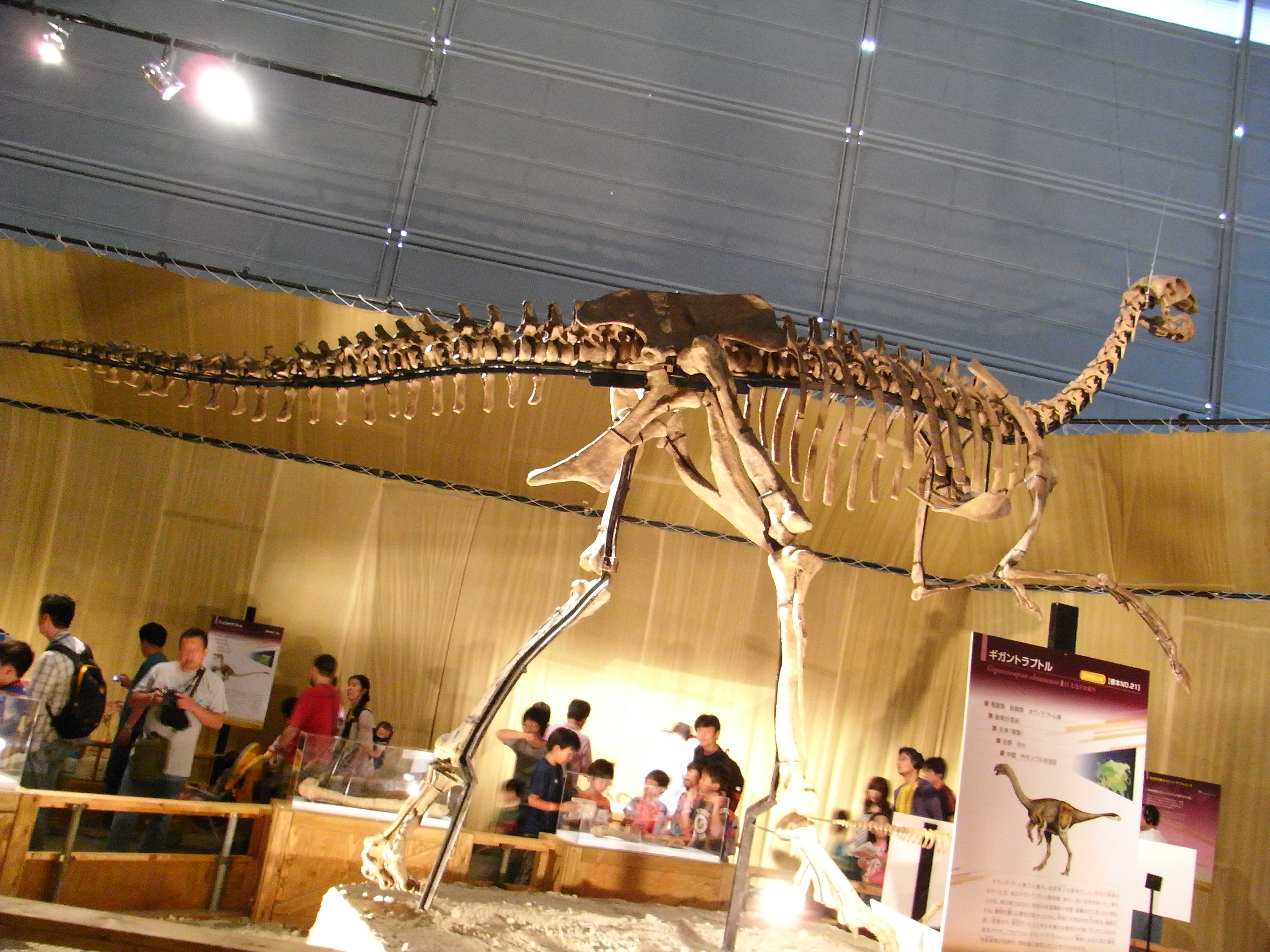 横から見たギガントラプトル。飼いたい・・・。